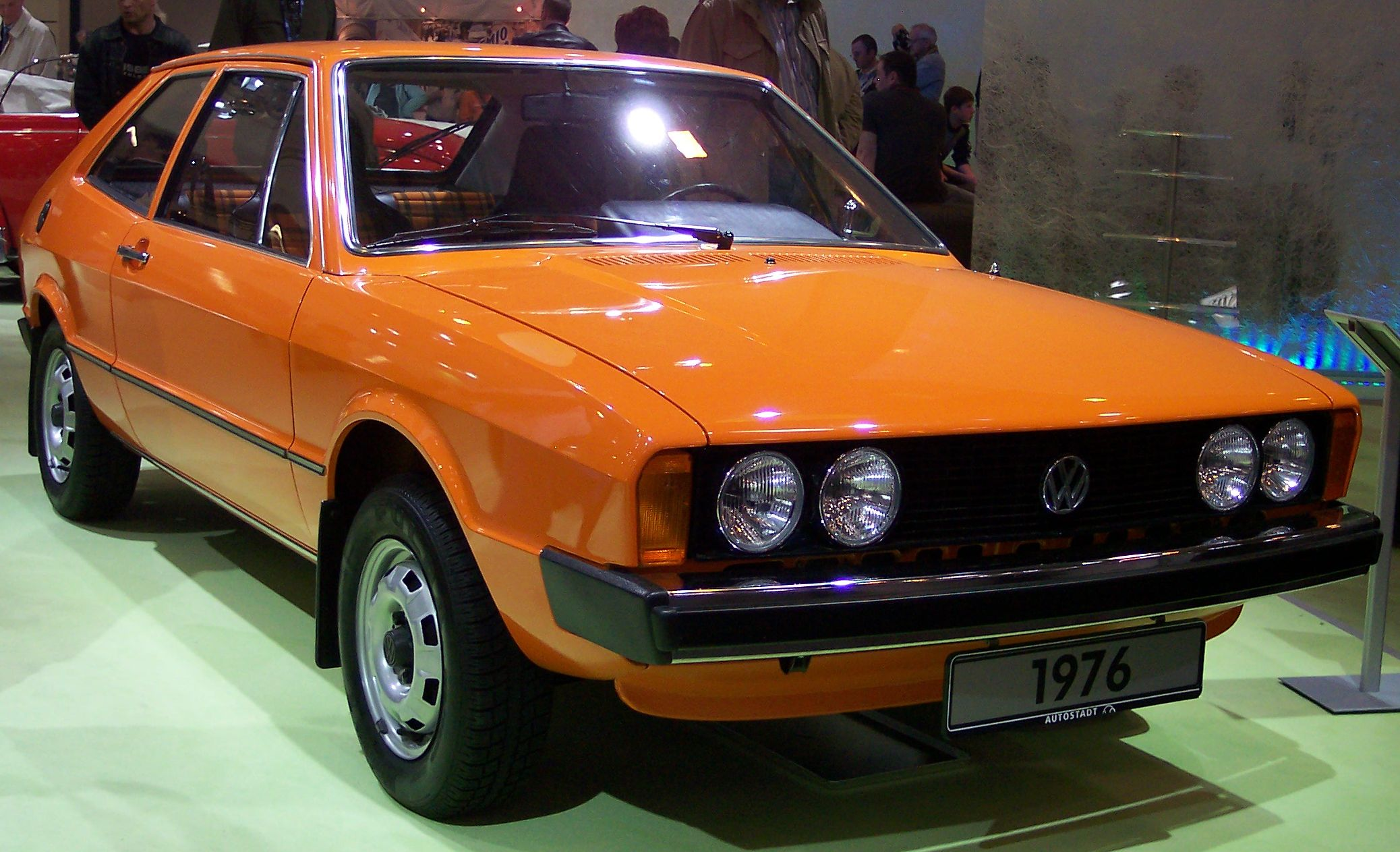 VW Scirocco I